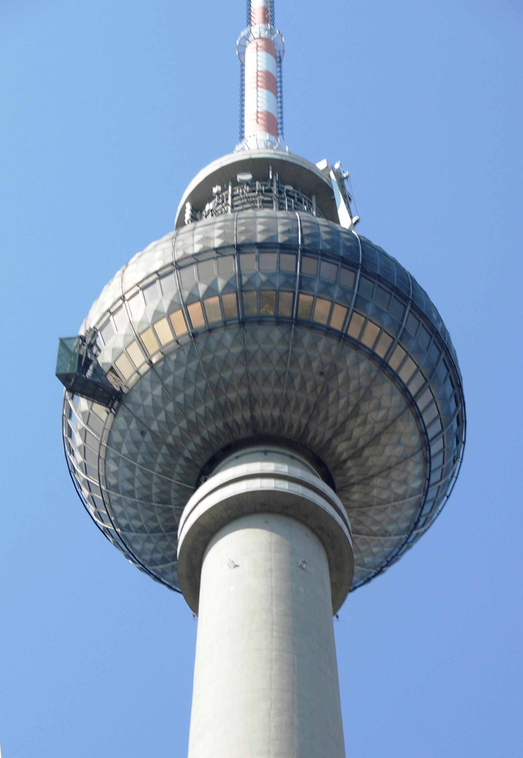 Berlín - Fernsehturm